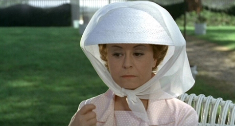 Képkocka a „Júlia és a szellemek” című filmből